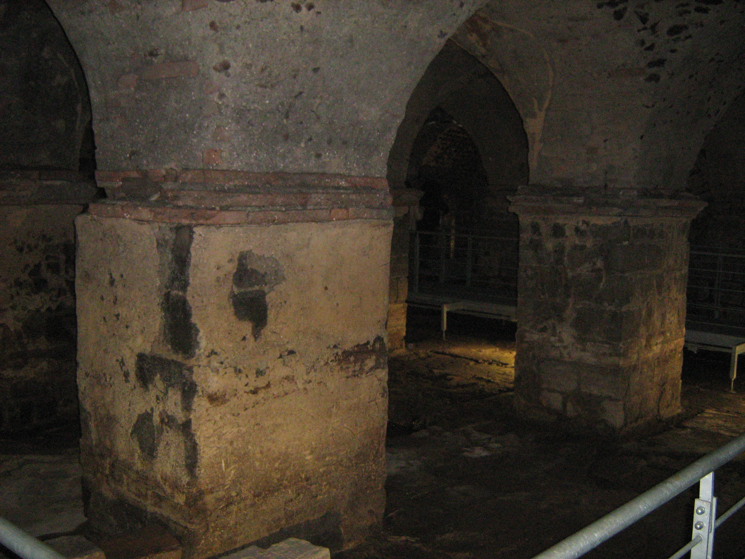 Terme, veduta interna